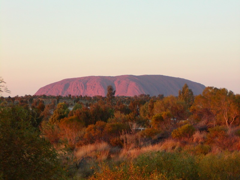 Lever du soleil sur Uluru Auteur : Utilisateur:THA-Zp